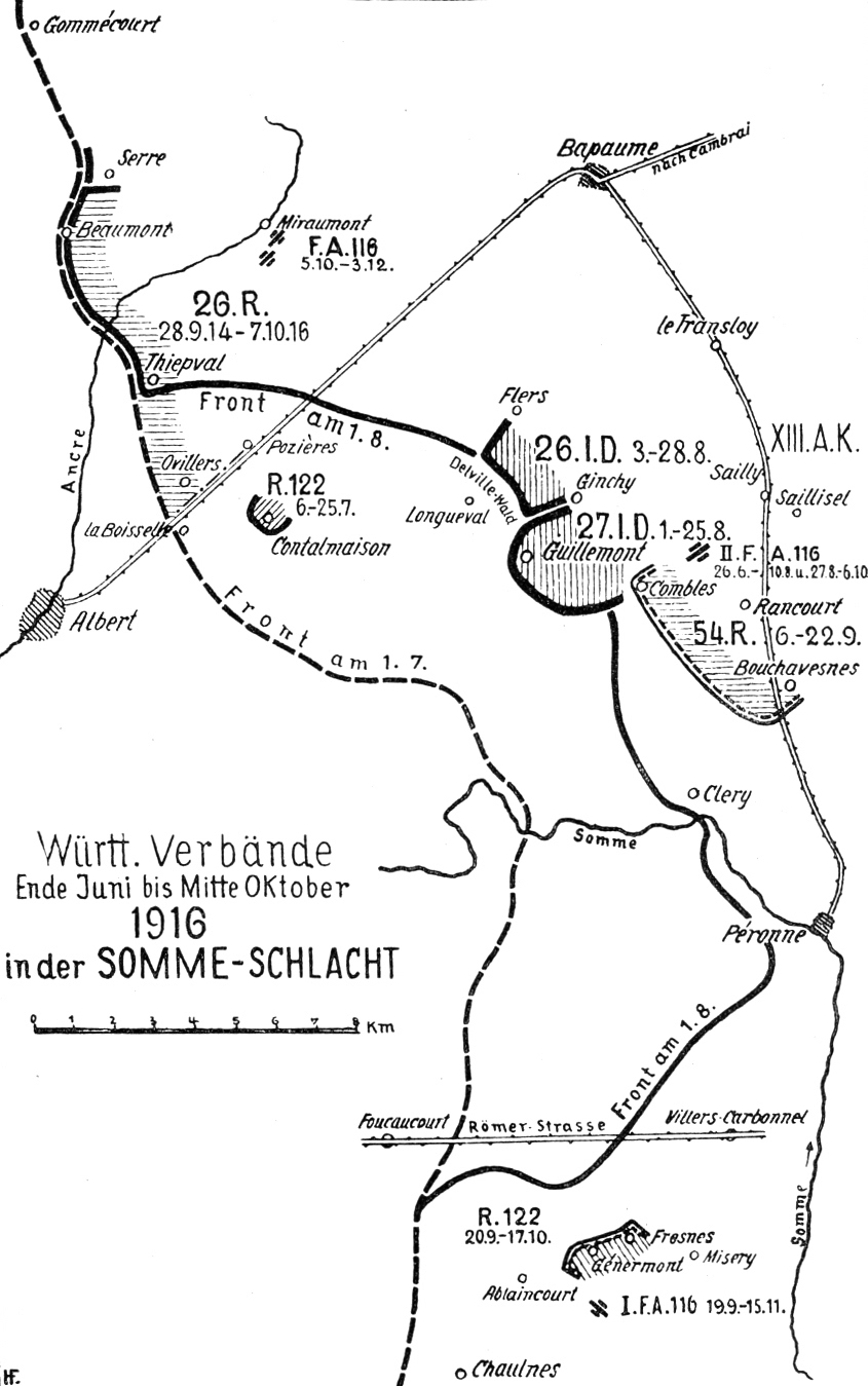 Karte: Württembergische Verbände in der Somme-Schlacht 1916